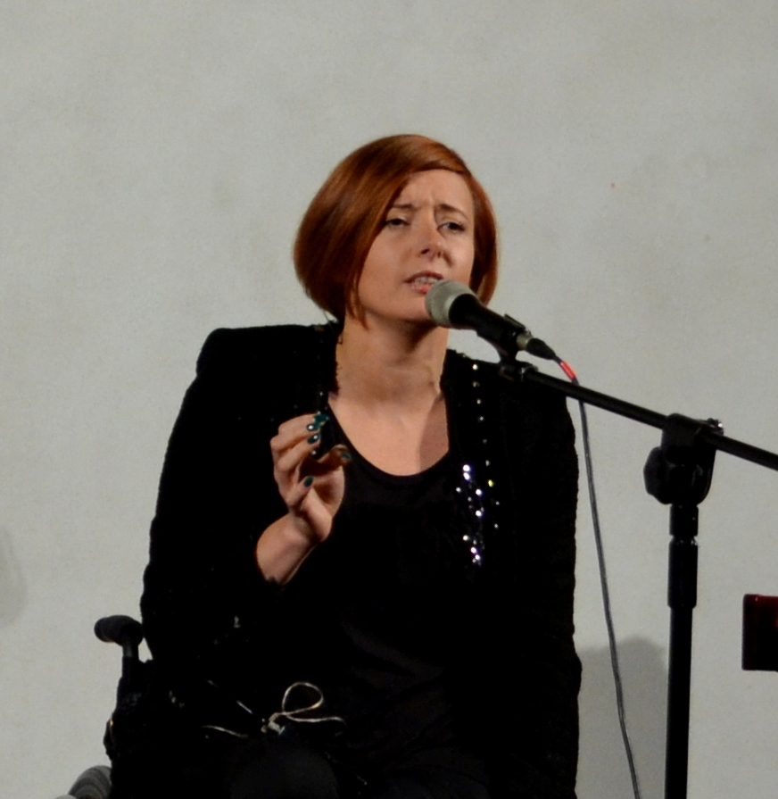 Koncert Dominikanie 2012